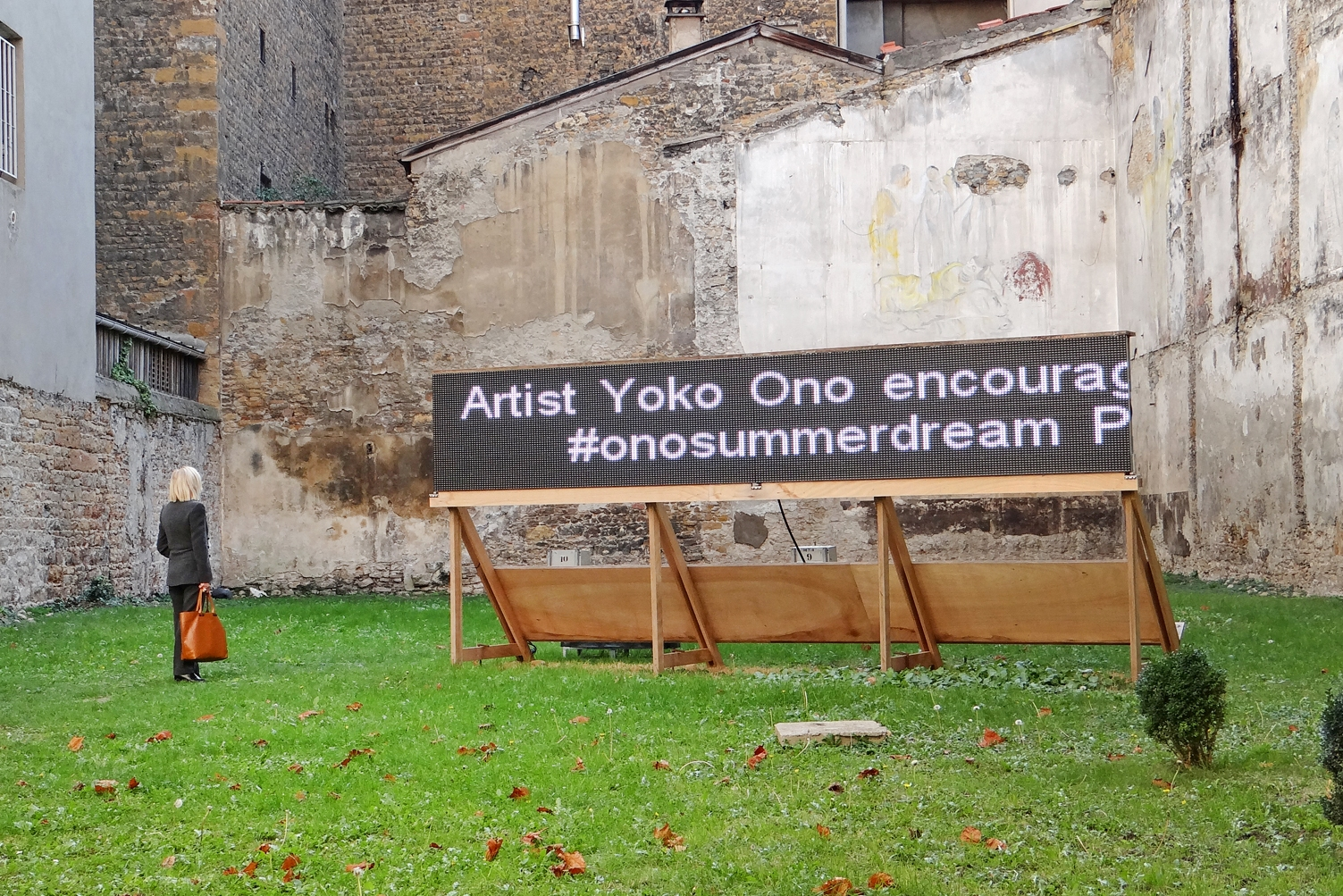 Summer Dream / Rêves d'été œuvre de l'artiste Yoko Ono créée pour la Biennale Cour de la Fondation Bullukian L'artiste propose aux visiteurs de décrire et de partager leurs rêves sur un réseau social spécifique qui les rediffuse en boucle sur des écrans comme celui installé à la fondation Bullukian La Fondation Bullukian